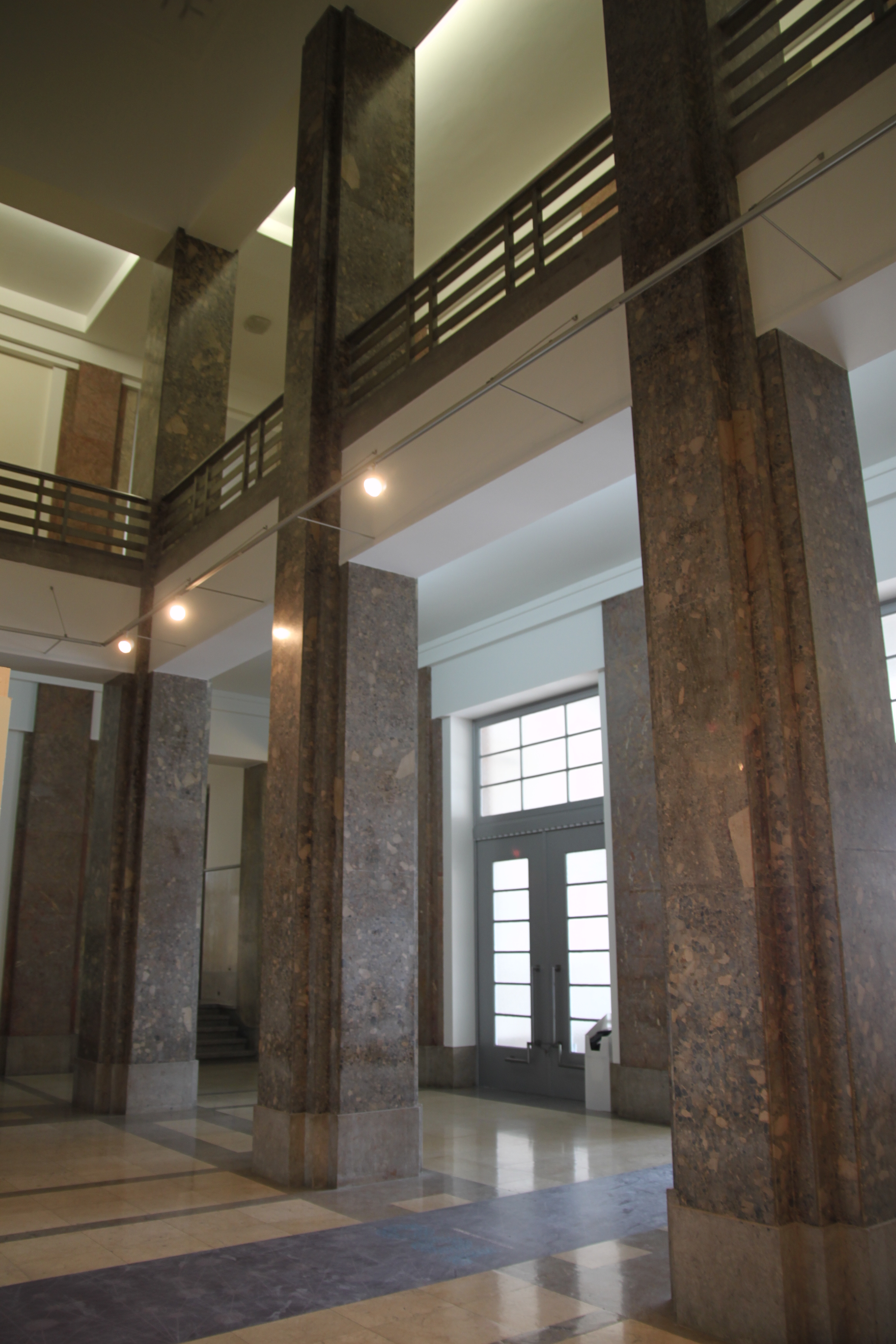 Instituto Superior Técnico This file was uploaded for Wiki Loves Monuments in Portugal with the unique identifier 97003162.